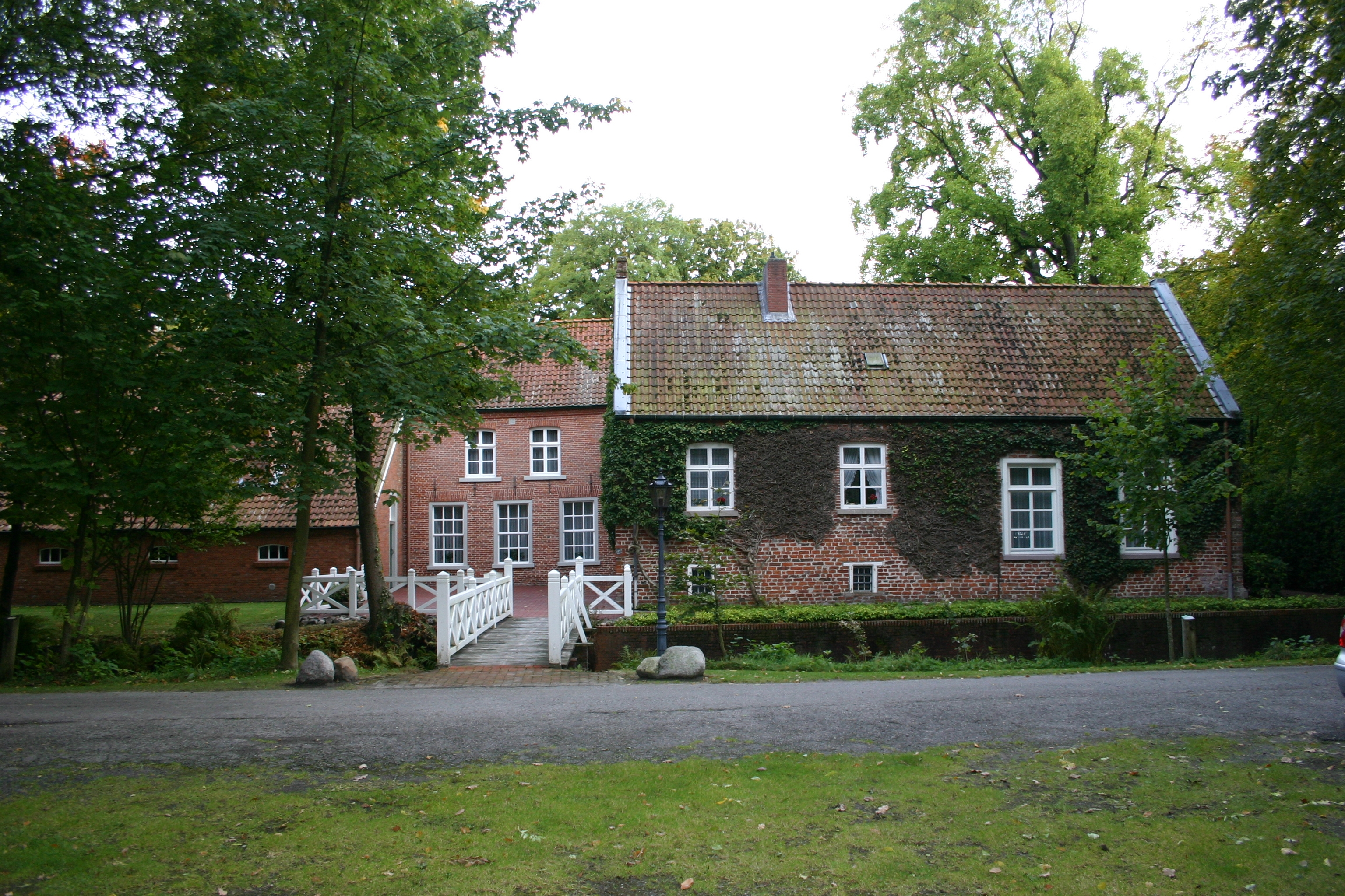 Gut Stikelkamp in der Samtgemeinde Hesel. Über mehr als zwei Jahrhunderte war das Gut Sitz der Familie Lantzius-Beninga.